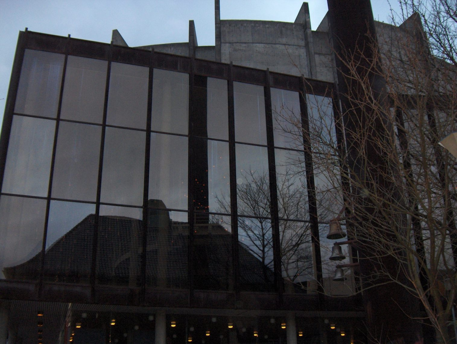 Grieghallen Own work, february 2006. Saty 16 novembre 2006 à 02:52 (CET)